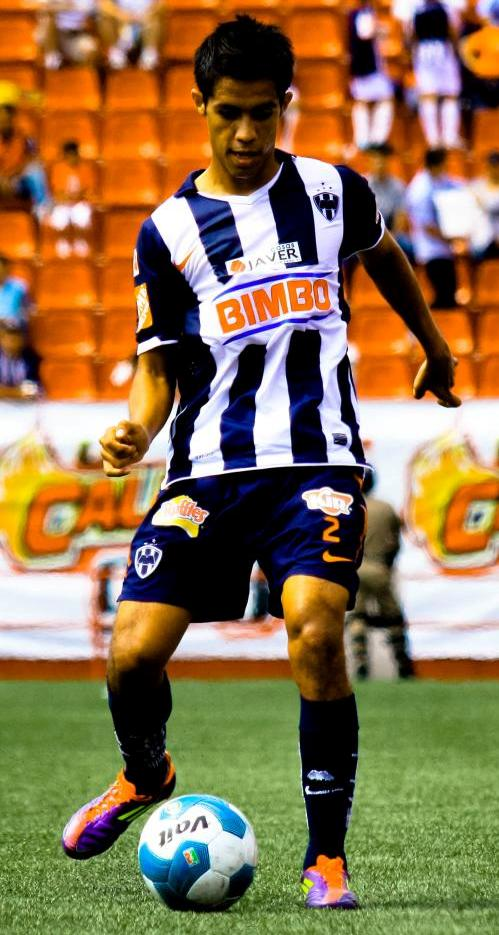 copa tijuana 2011, cuadrangular disputado por monterrey puebla san luis y xolos en el estadio caliente de tijuana, mas info fotos y videos en